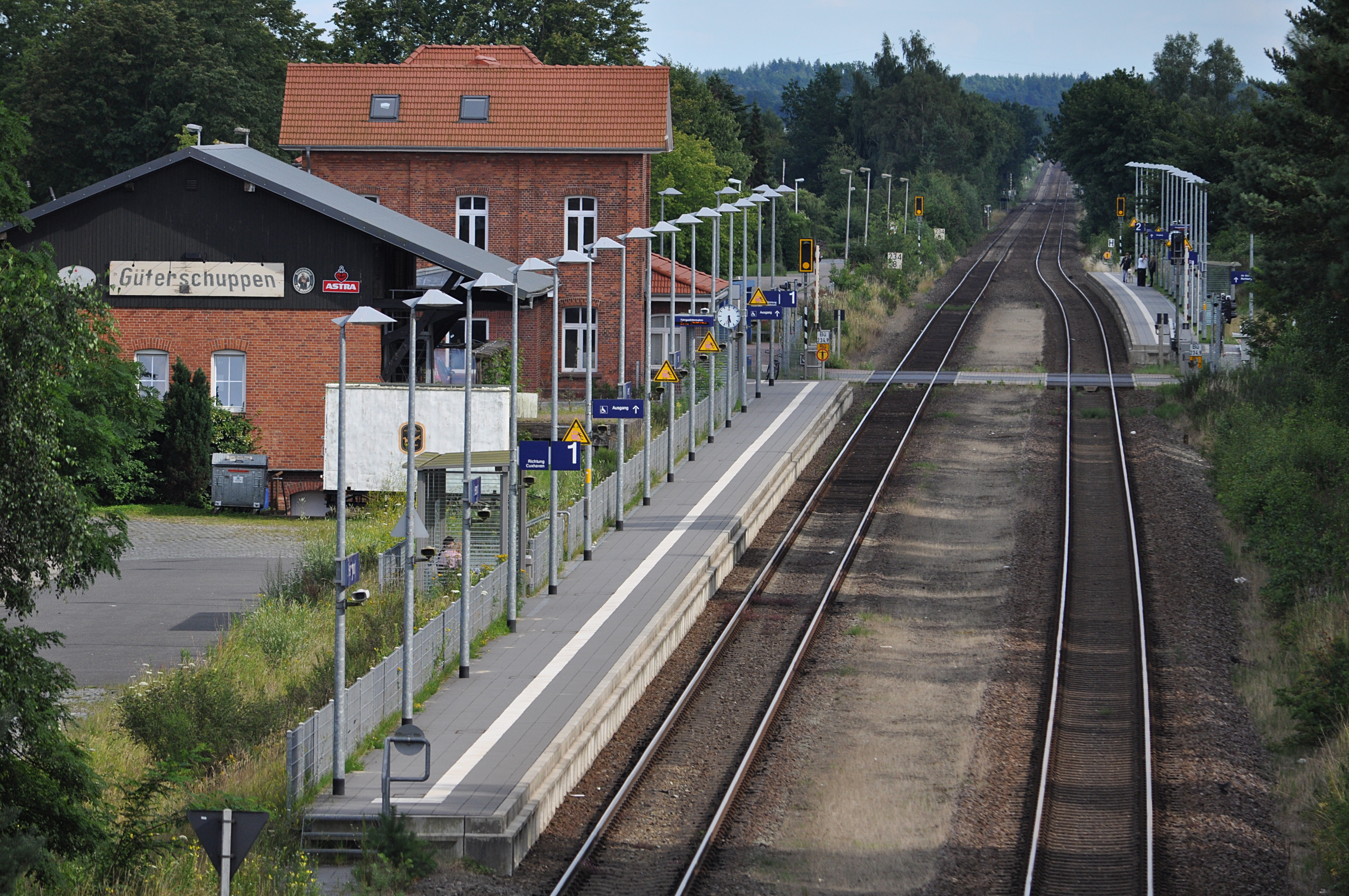 Bahnhof Hemmoor der Niederelbebahn von der Brücke der B 495 aus gesehen.